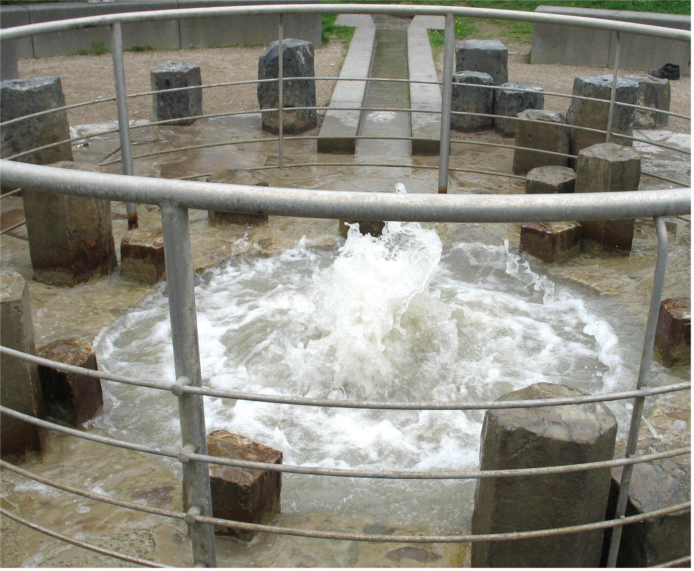 De Brubbel zu Wallenborn (Vulkaneifel) an Aktioun.